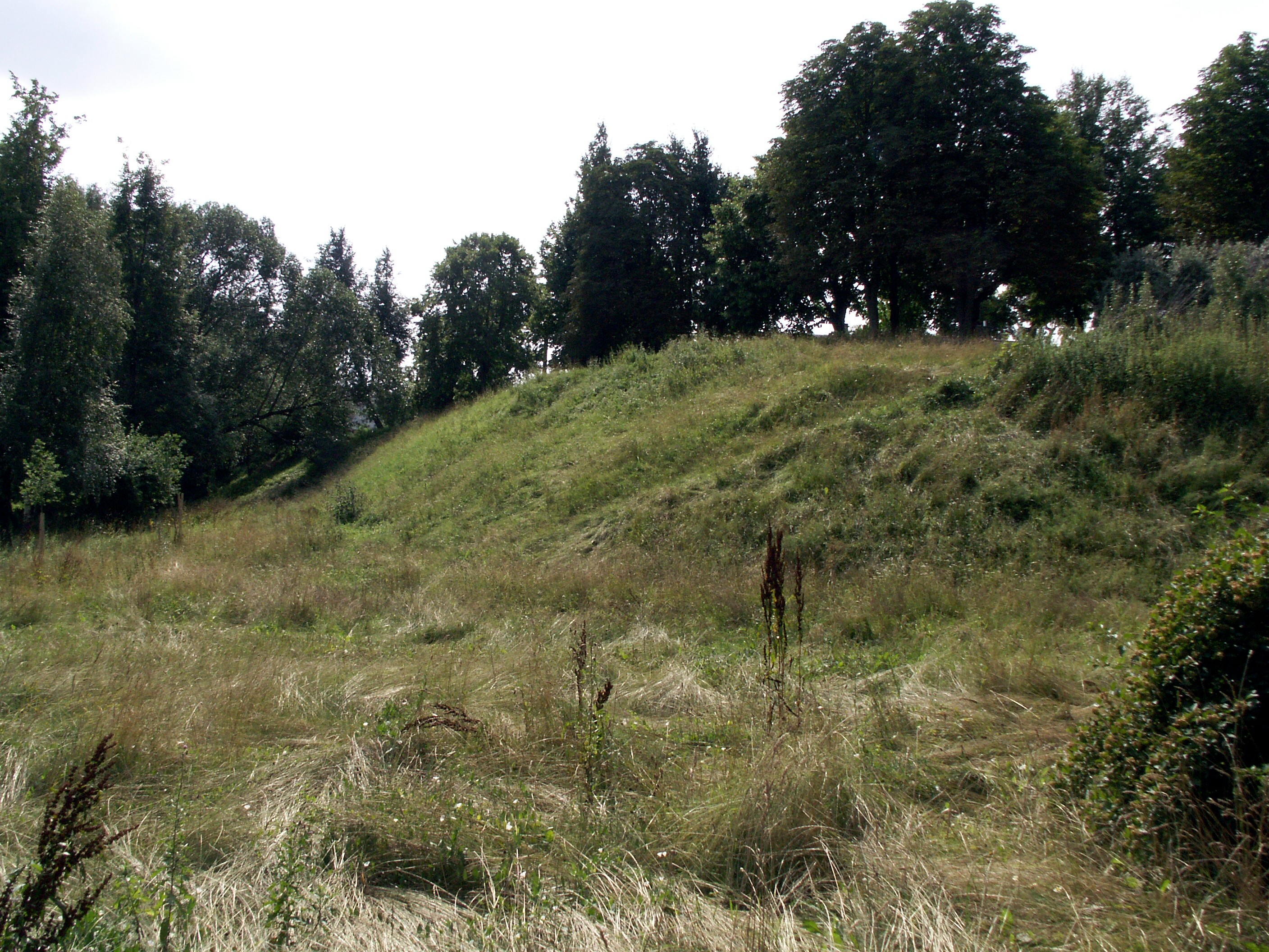 Limanto kalnas, Kaukazas (Šiauliai)